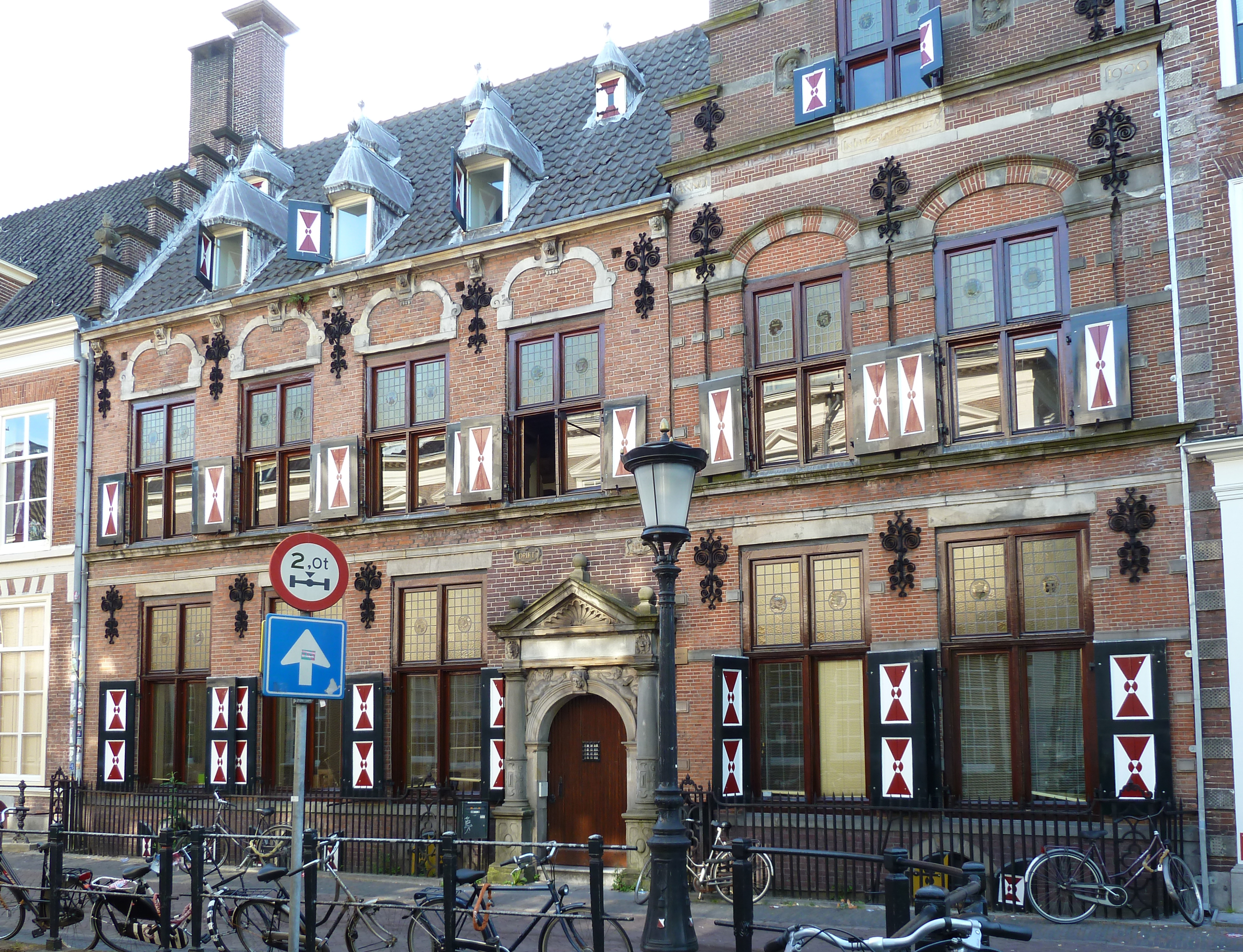 Drift 17, Utrecht, NL. Huis Ledenberch, Rijksmonument.